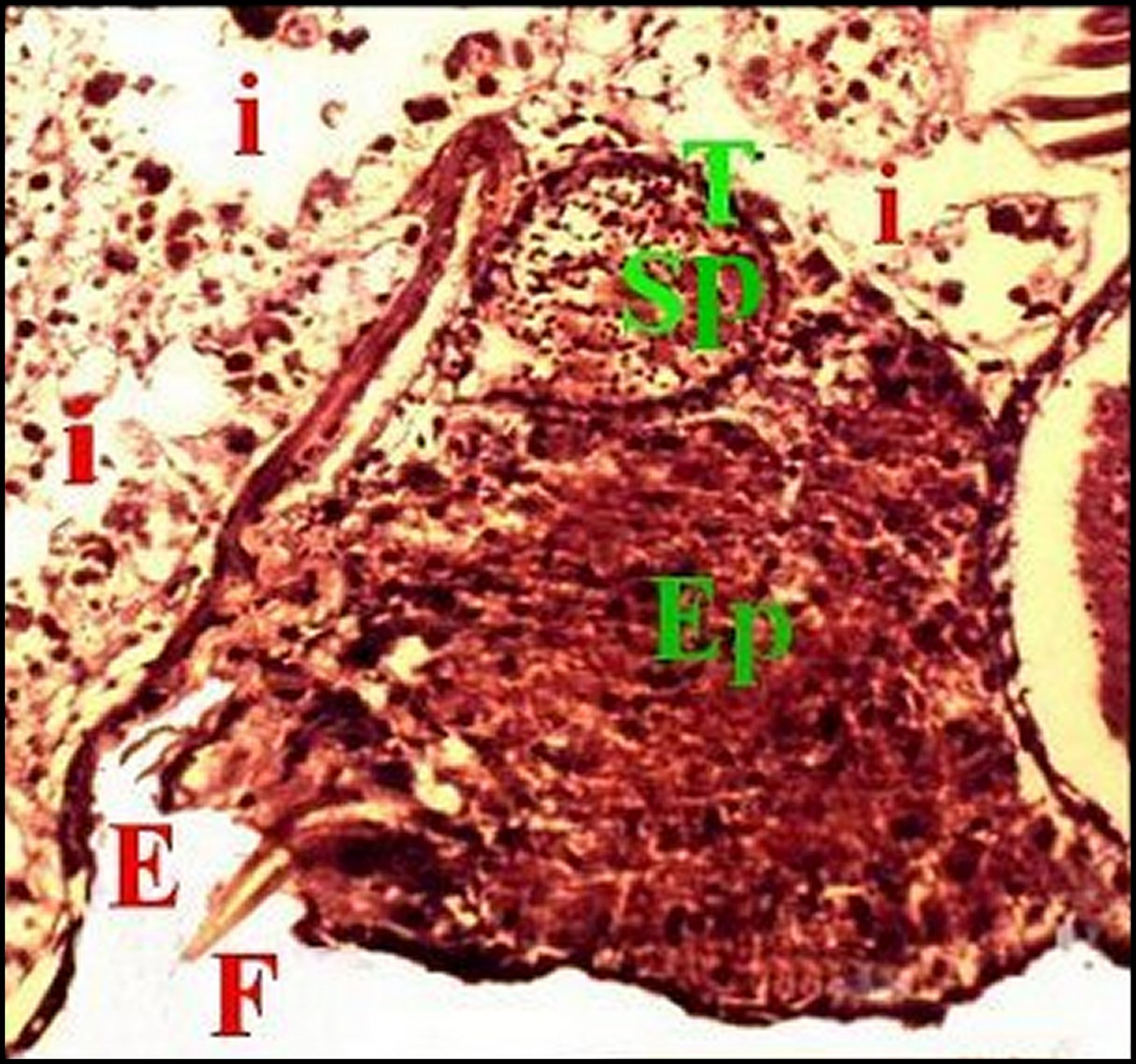 Glandes prégonoporales d' Eresus niger en coupe histologique